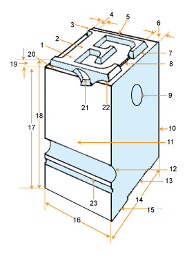 El tipus i les seves parts: Asta Ull Gràcia (terminal) Alineació esquerra Muscle inferior Alineació dreta Muscle dret Relleu intern Marca del punxó Cara posterior Cara anterior Cran principal Canal inferior Cos Peu Gruix o amplària Arbre Altura Alçada Muscle esquerre Accent Muscle superior Cran secundari